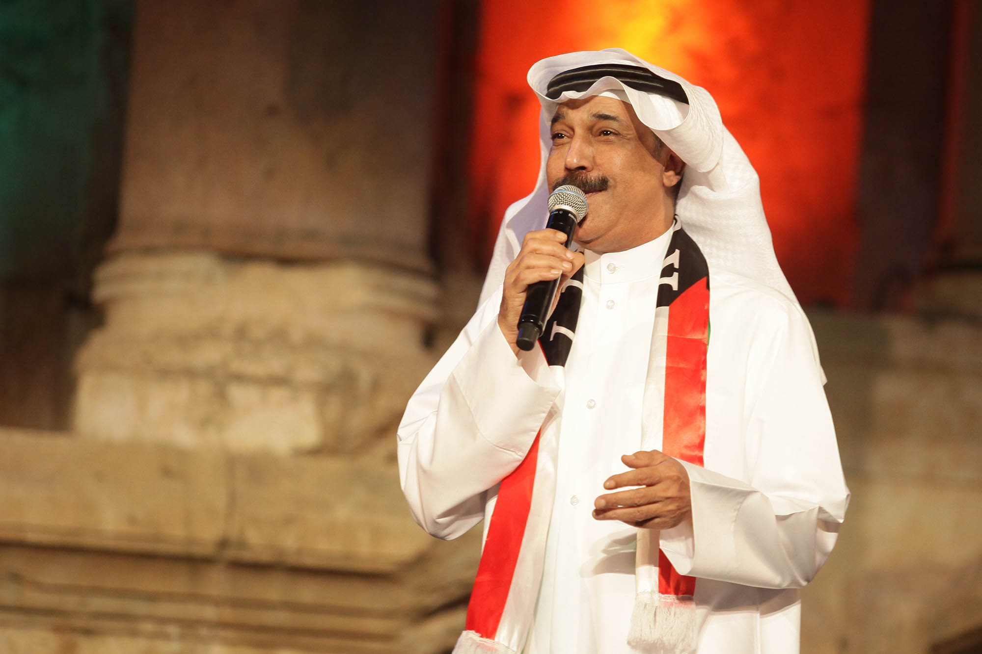 مهرجان جرش 2018 تصوير أحمد عبده الشركة الأردنية للصحافة والنشر الدستور ا